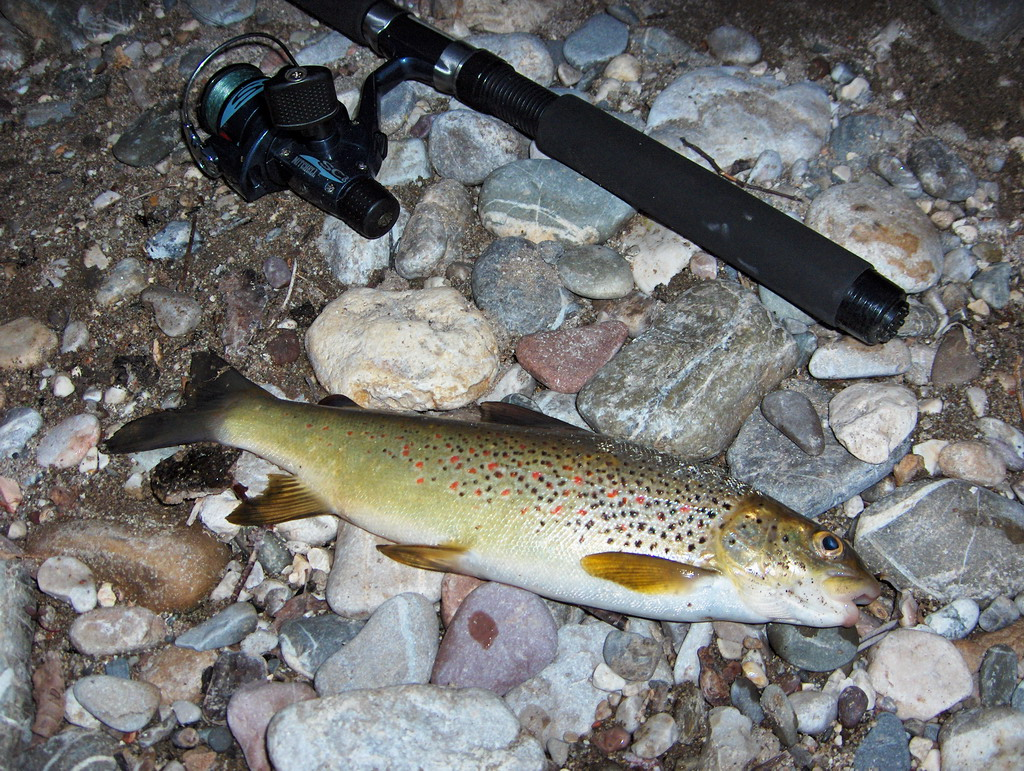 La truite aux lèvre molles (Salmo obtusirostris) capturée dans la rivière Neretva, en Bosnie-Herzétovine, le 22 juillet 2004